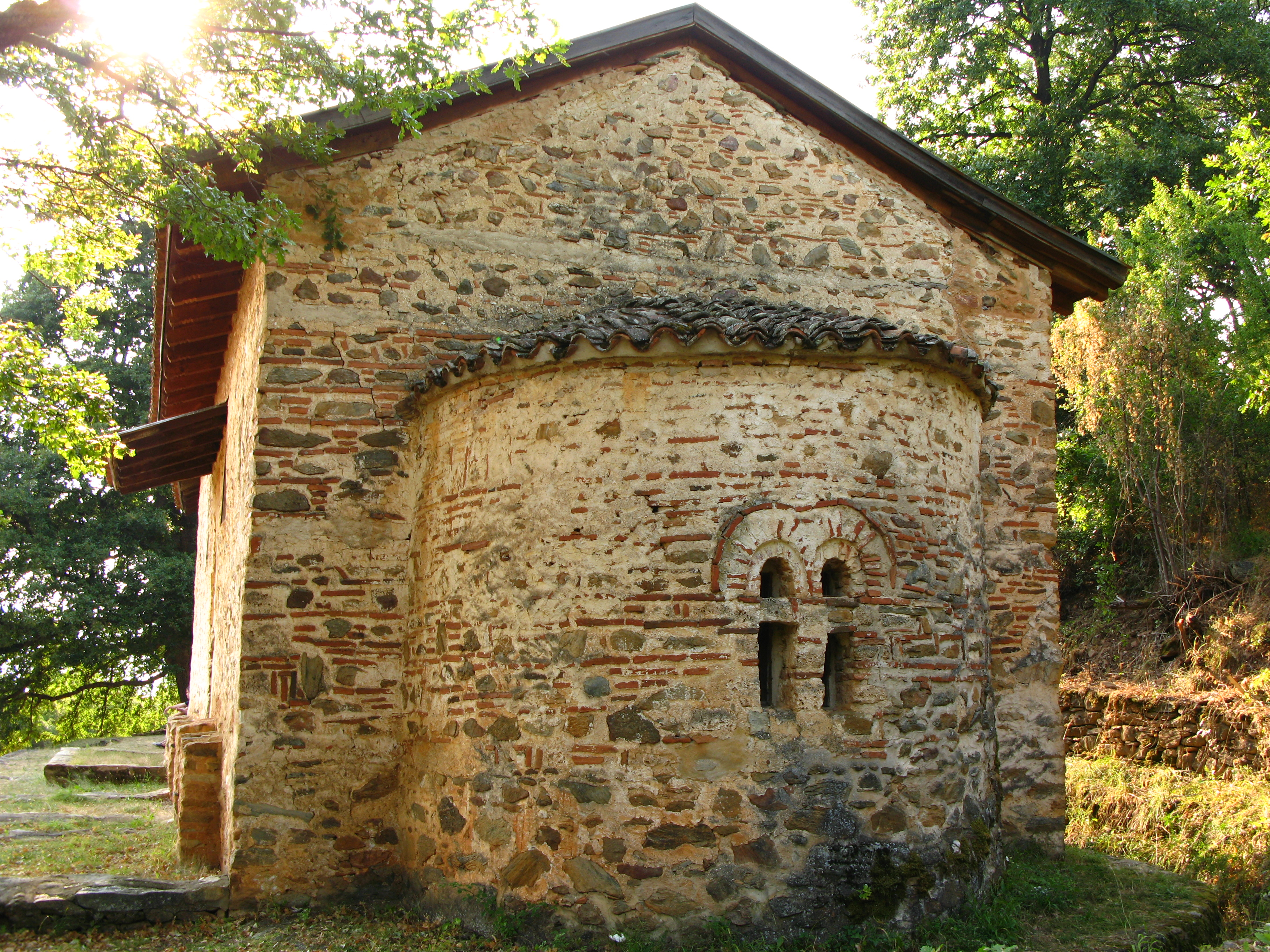 Црква Св. Ђорђа, Курбиново, преспанско.